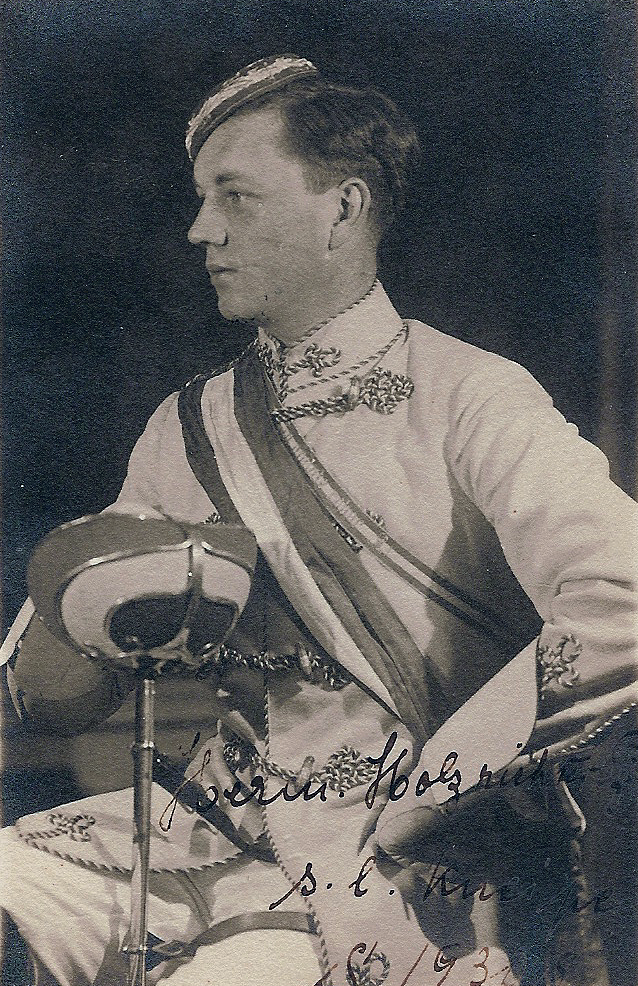 Dr. Hermann Holzrichter, Vorstand Linde AG, hier als Student der T! Gotia 1930